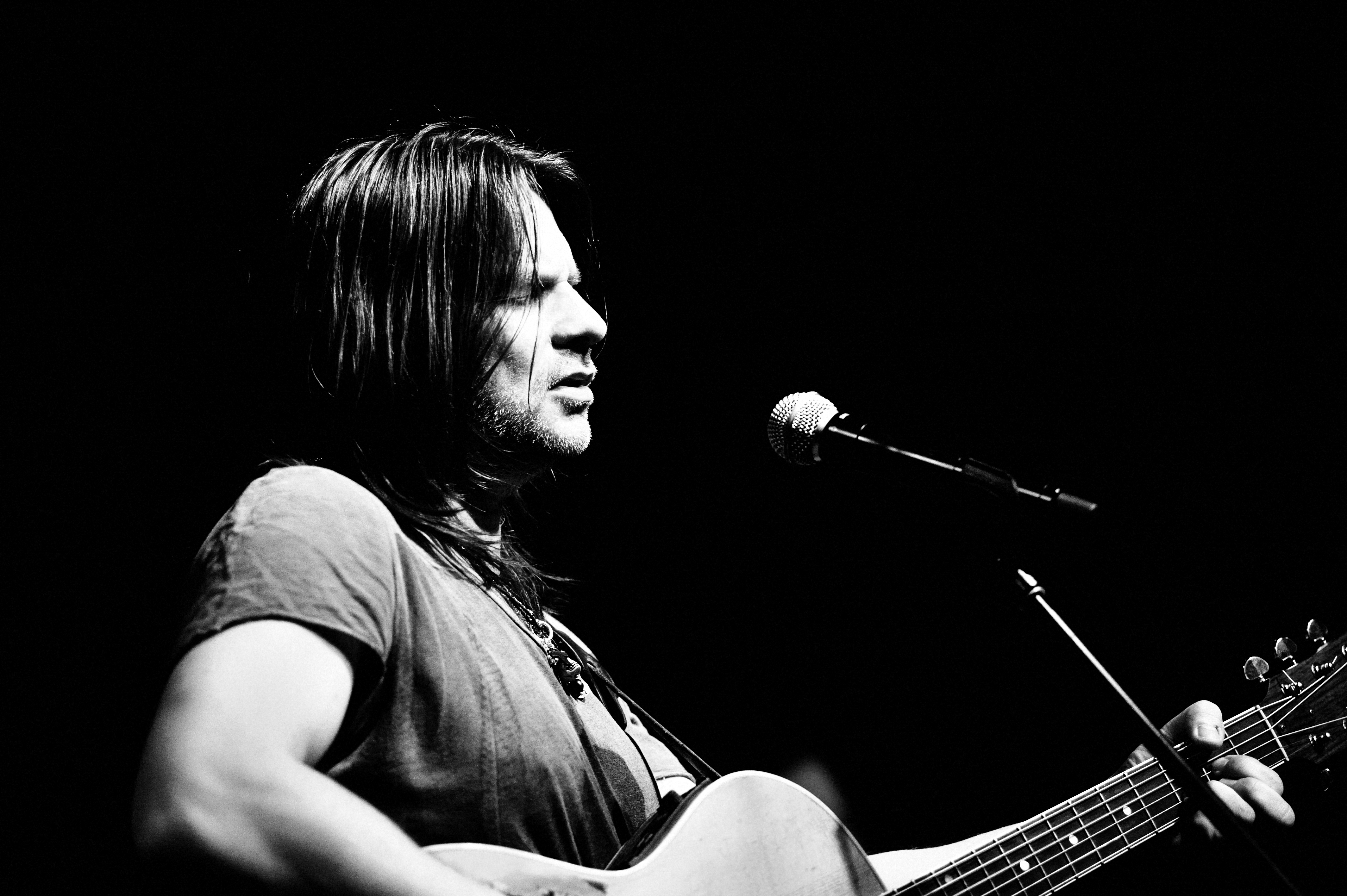 Ray Wilson während eines Konzerts am 07.04.2013 in der Blues Garage isernhagen, Deutschland